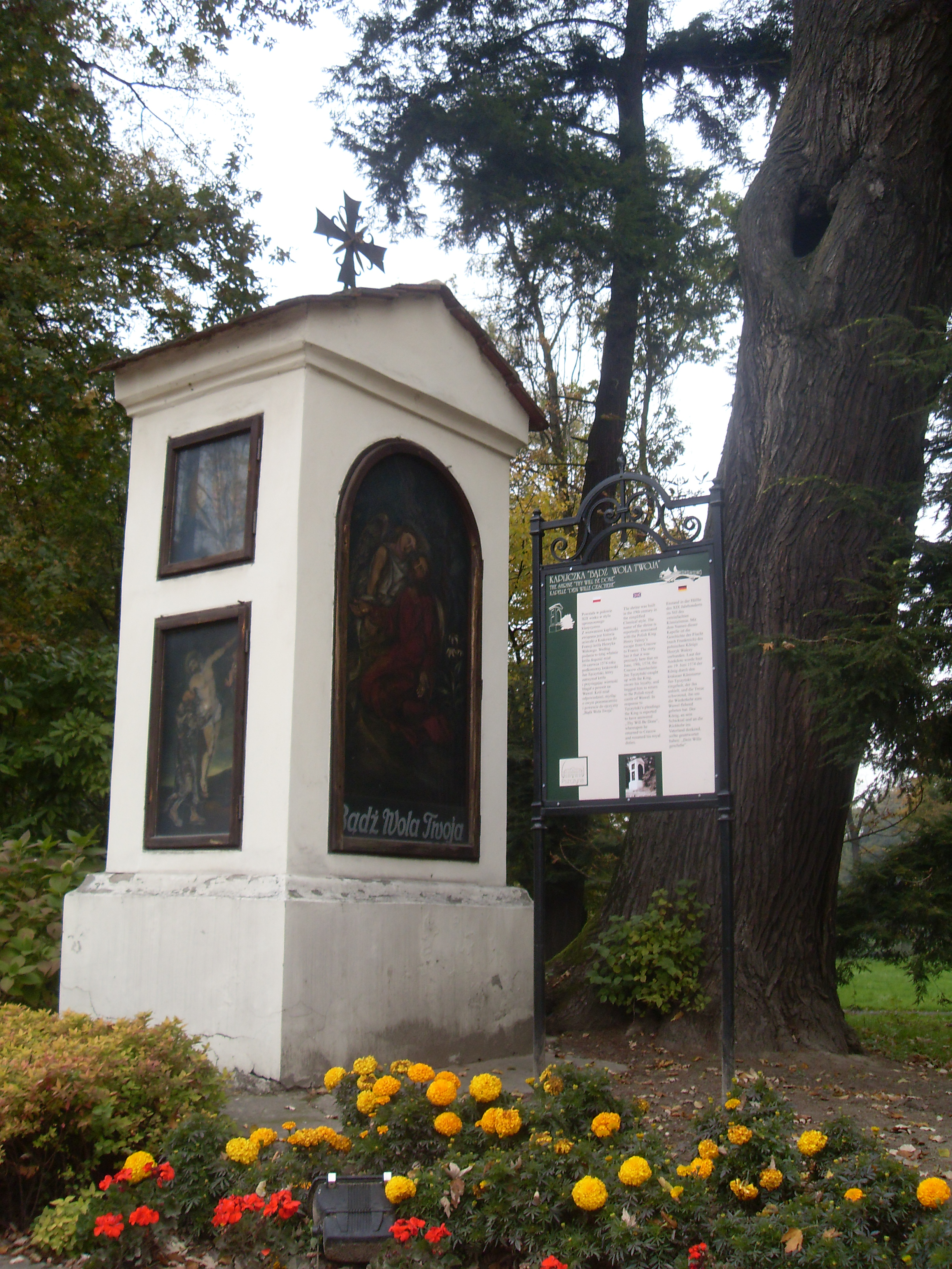 Kapliczka w Pszczynie wystawiona według tradycji w miejscu, gdzie delegacja polska dopędziła Henryka Walezego, prosząc go o powrót na tron polski.